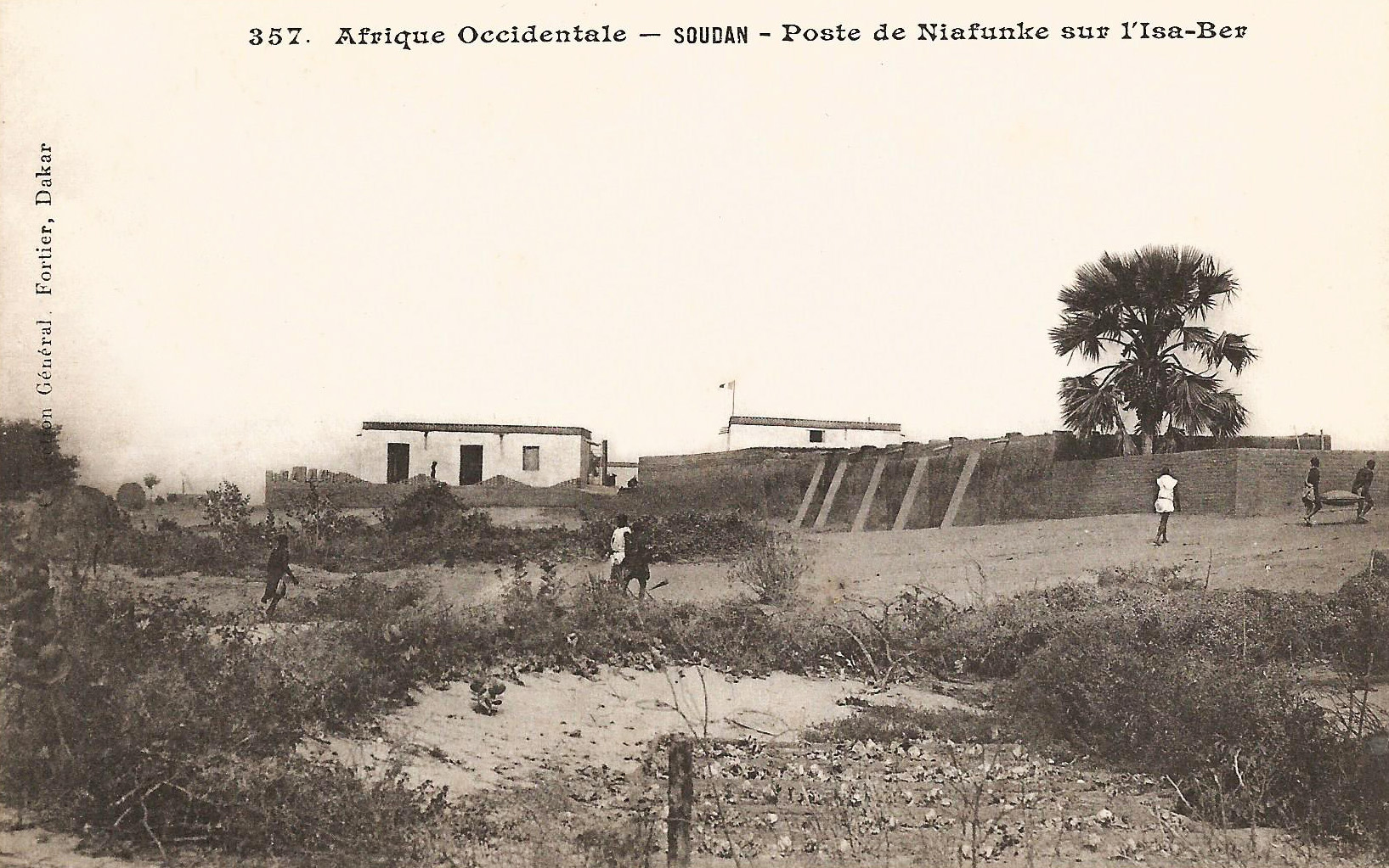 François-Edmond Fortier, Poste de Niafunké sur l'Isa-Ber. Afrique Occidentale - Soudan.